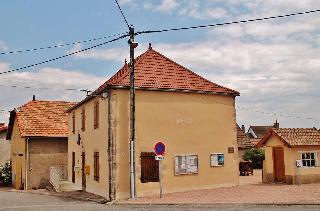 La Mairie